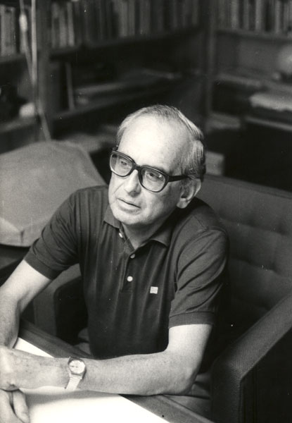 Javier Mariategui, 1988